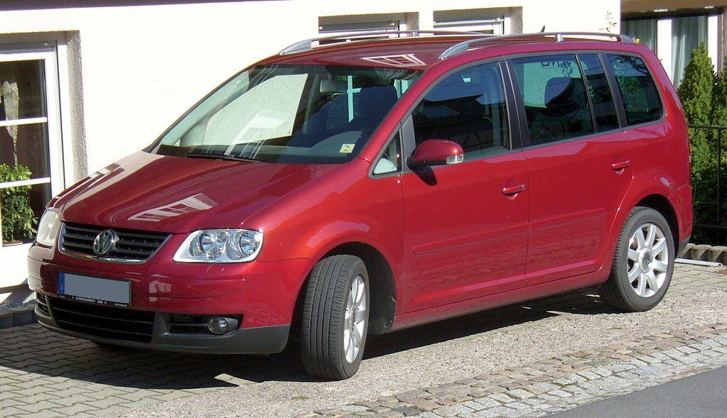 VW Touran